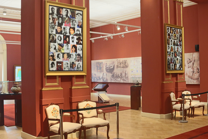 Este espacio fue inaugurado el 14 de abril de 2014, reemplazó al anteriormente denominado Salón Colón y fue bautizado en homenaje a los pueblos originarios. Se sitúa en la planta baja del Palacio de Gobierno, de cara al Río de la Plata, y dispone de una hermosa vista a la plaza Colón.